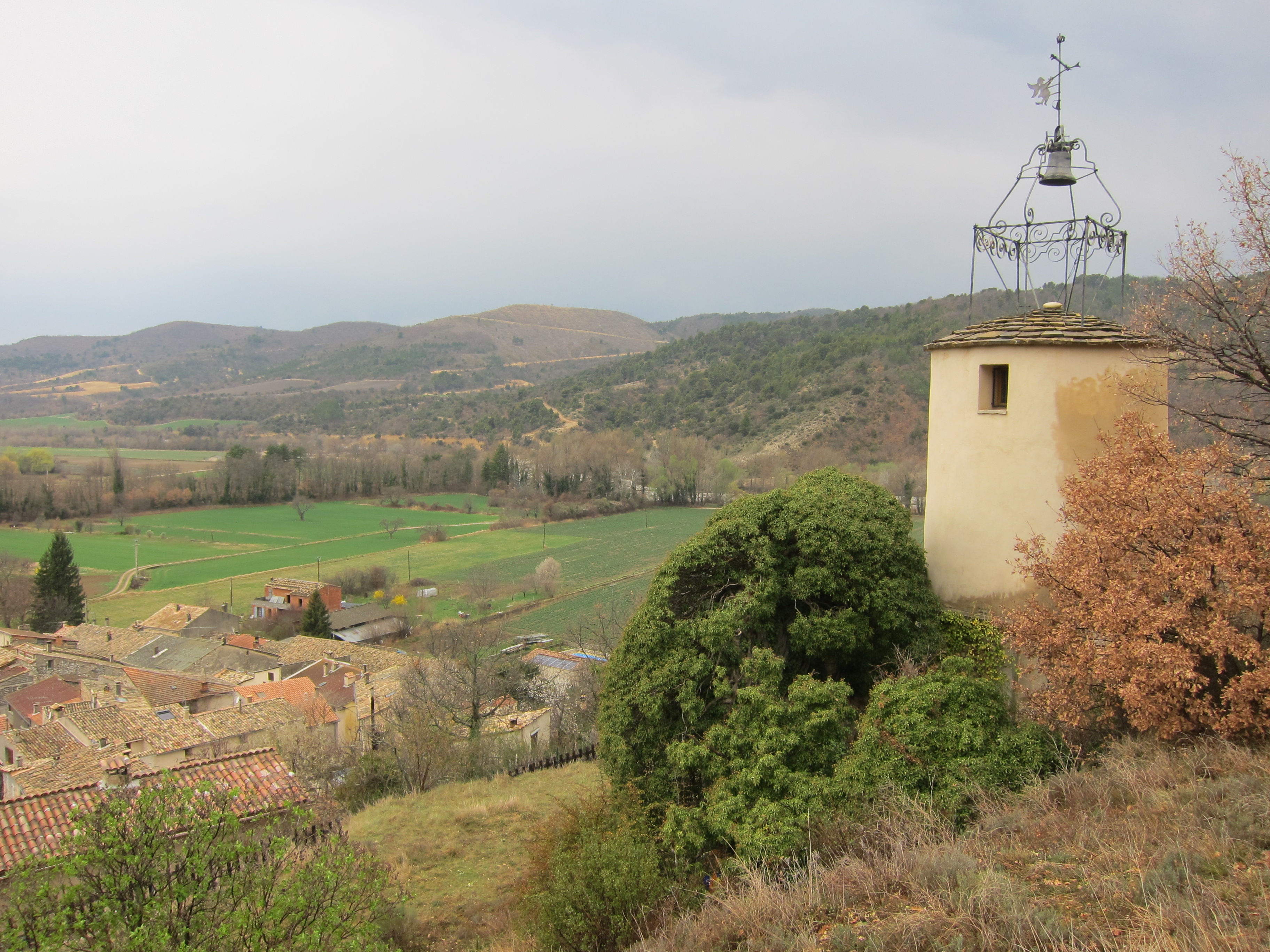 La Tour de l'Horloge, prise de vue en direction Ouest-Nord-Ouest